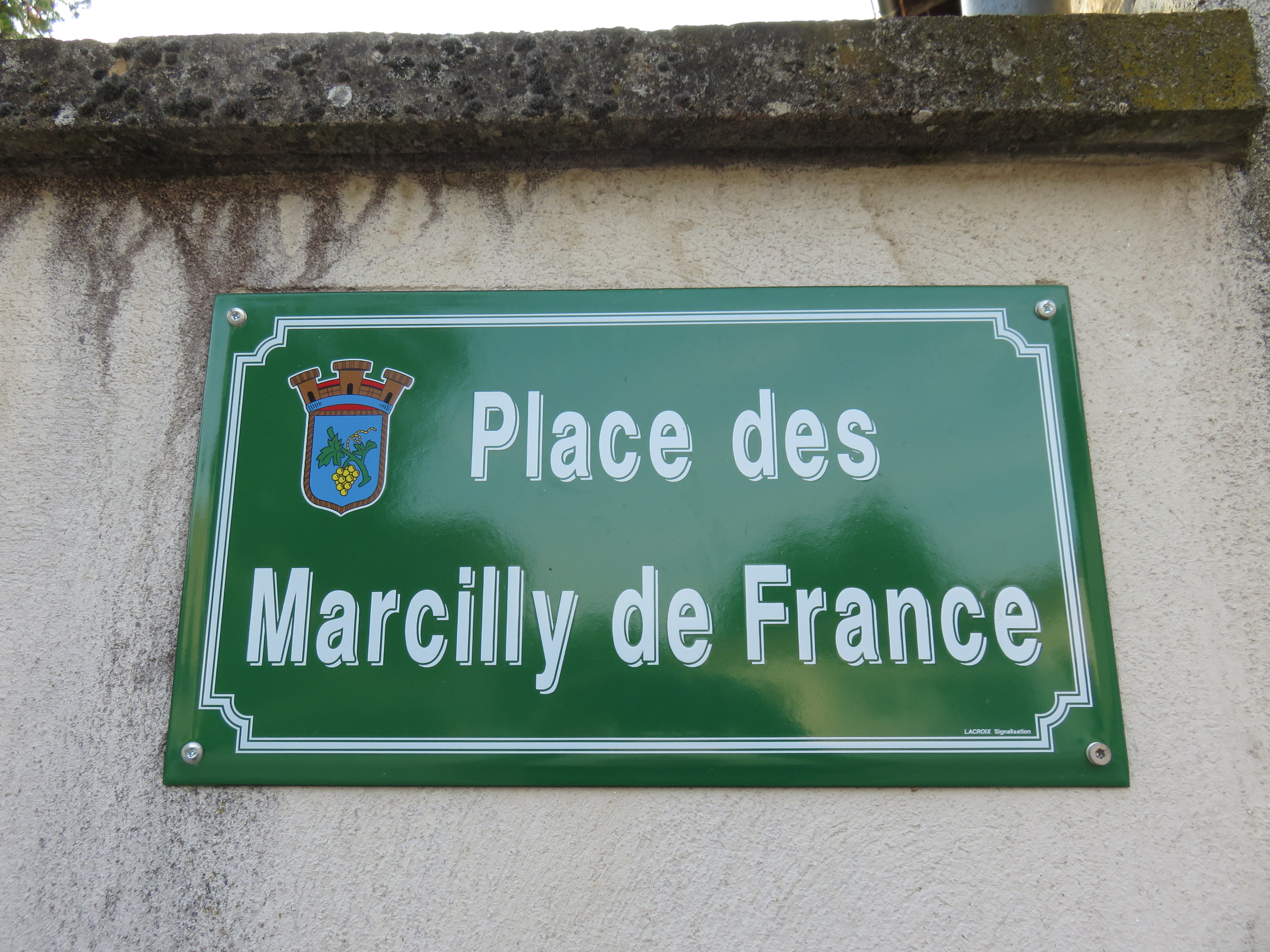 Plaque de la place des Marcilly de France, à Marcilly-d'Azergues (Rhône, France).